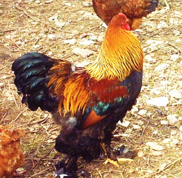 Coq brahma